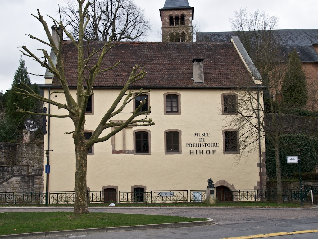 Sujet: Den Hihof mam Virgeschichtsmusée zu Iechternach Source: Fotograf Benotzer:Cornischong